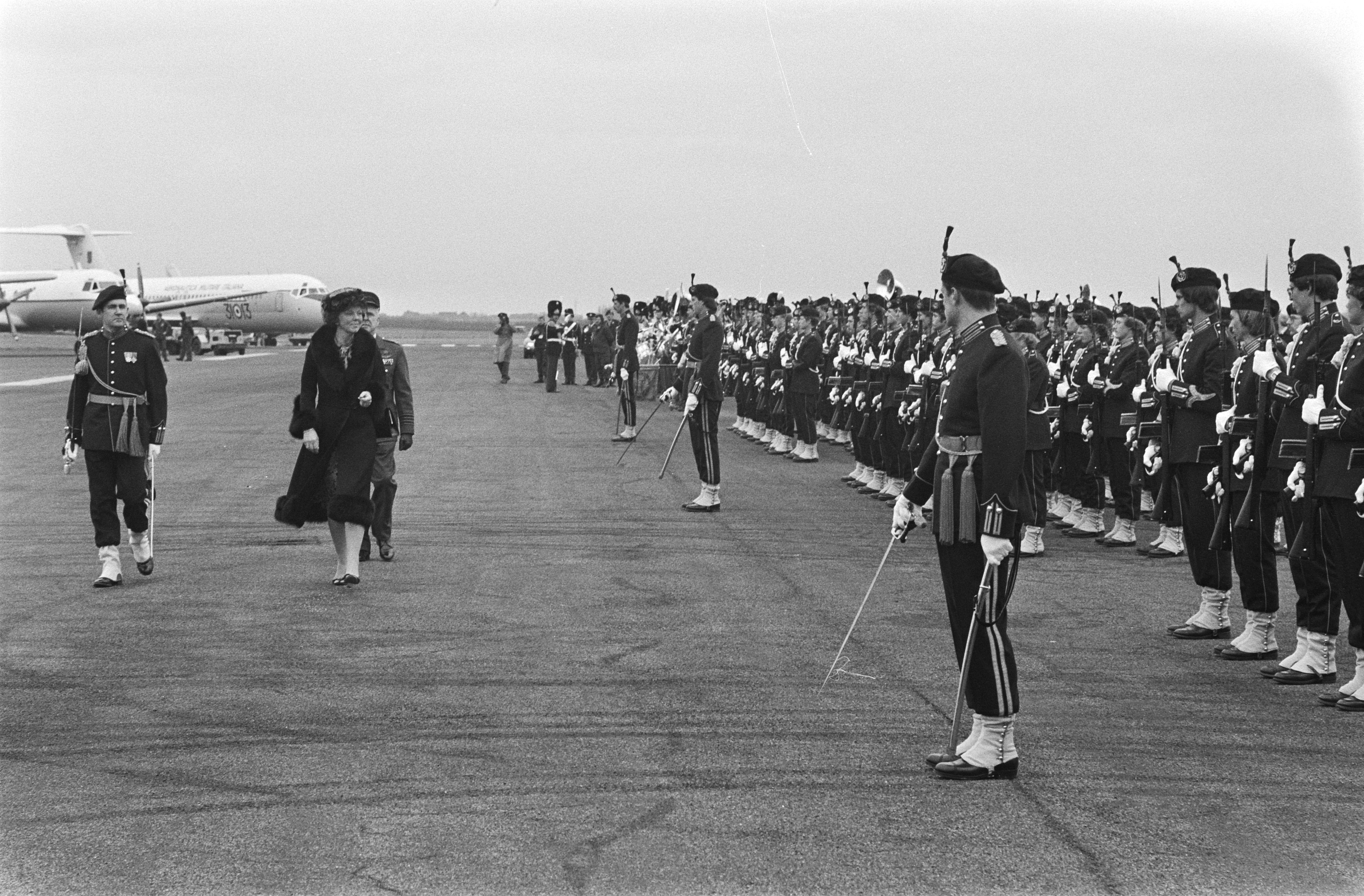 Collectie / Archief : Fotocollectie Anefo Reportage / Serie : [ onbekend ] Beschrijving : Europese Raad in Maastricht, Koningin Beatrix inspecteert de erewacht bij vliegveld Beek Datum : 23 maart 1981 Locatie : Beek, Maastricht Trefwoorden : erewachten, koninginnen, vliegvelden Persoonsnaam : Beatrix, koningin Fotograaf : Croes, Rob C. / Anefo Auteursrechthebbende : Nationaal Archief Materiaalsoort : Negatief (zwart/wit) Nummer archiefinventaris : bekijk toegang 2.24.01.05 Bestanddeelnummer : 931-3900